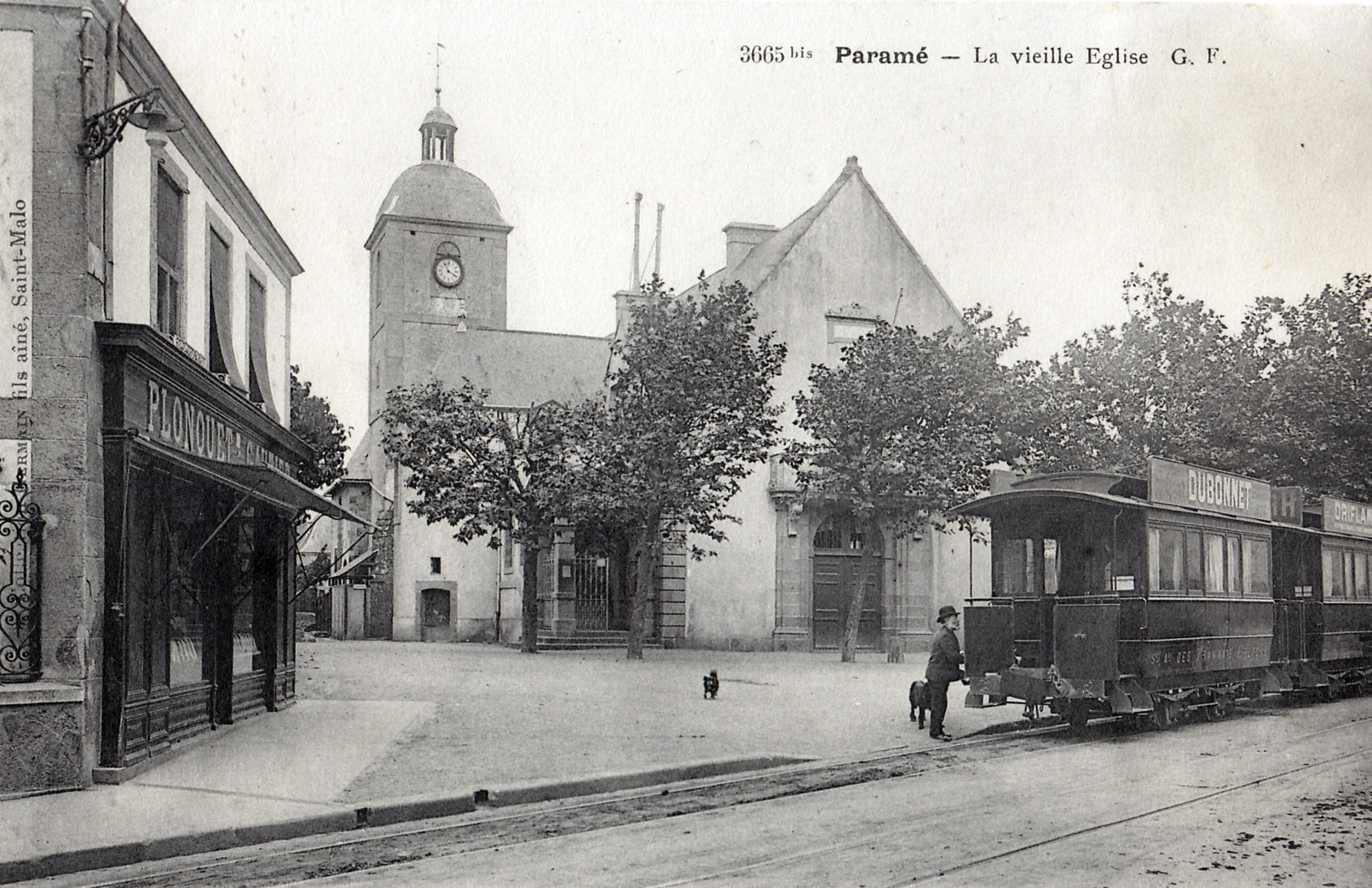 Carte postale ancienne éditée par GF, n°3665 bis : PARAME - La vieille église